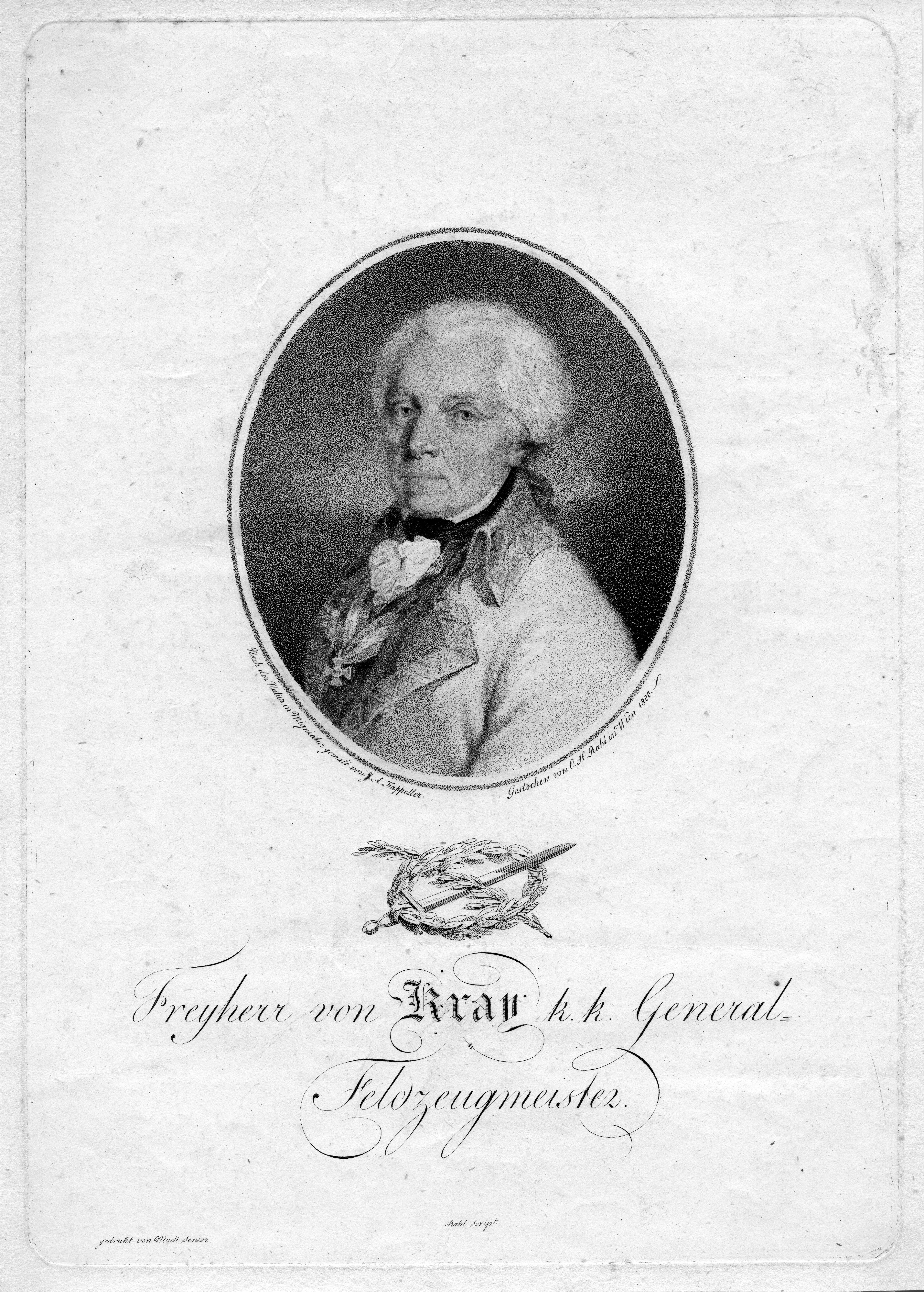 portrait gravé